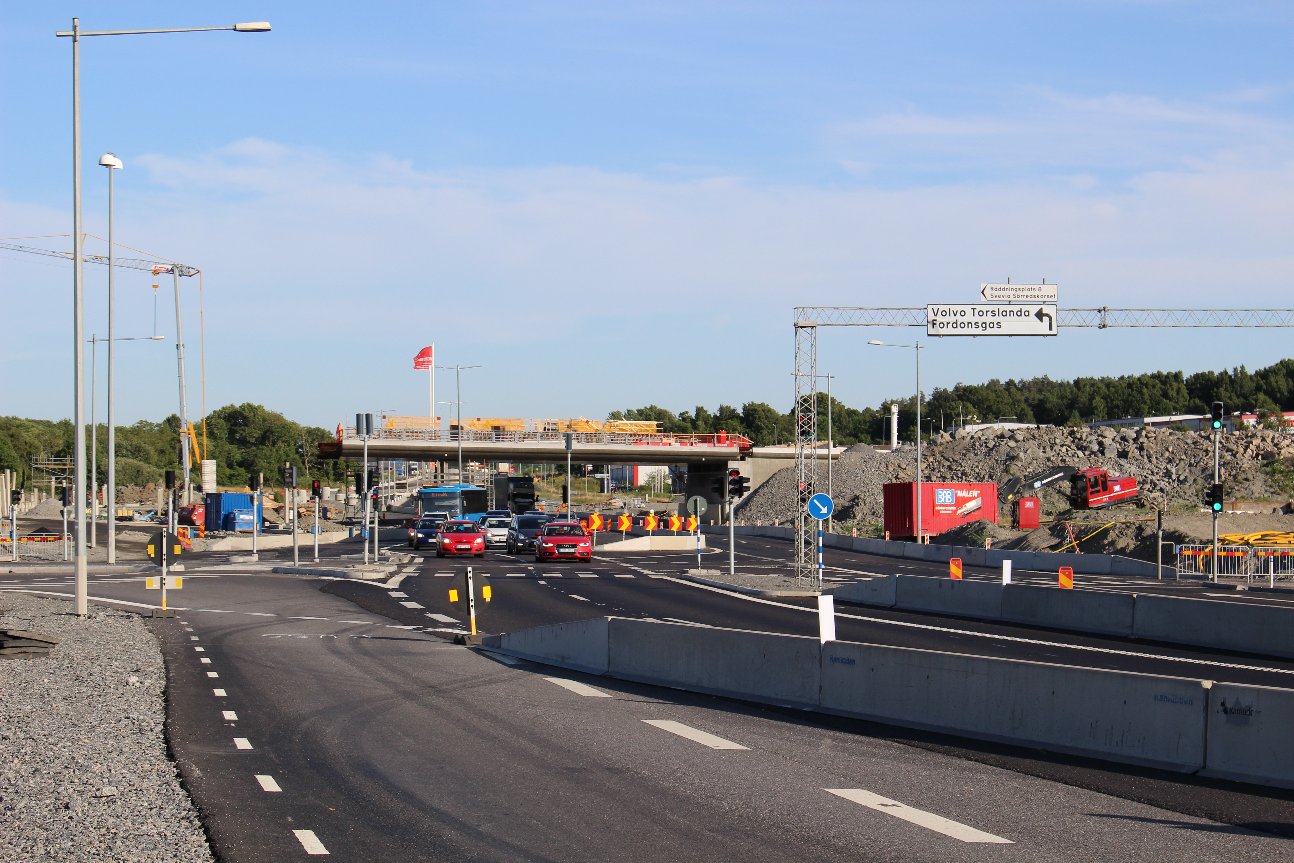 Torslandavägen mot sydost.